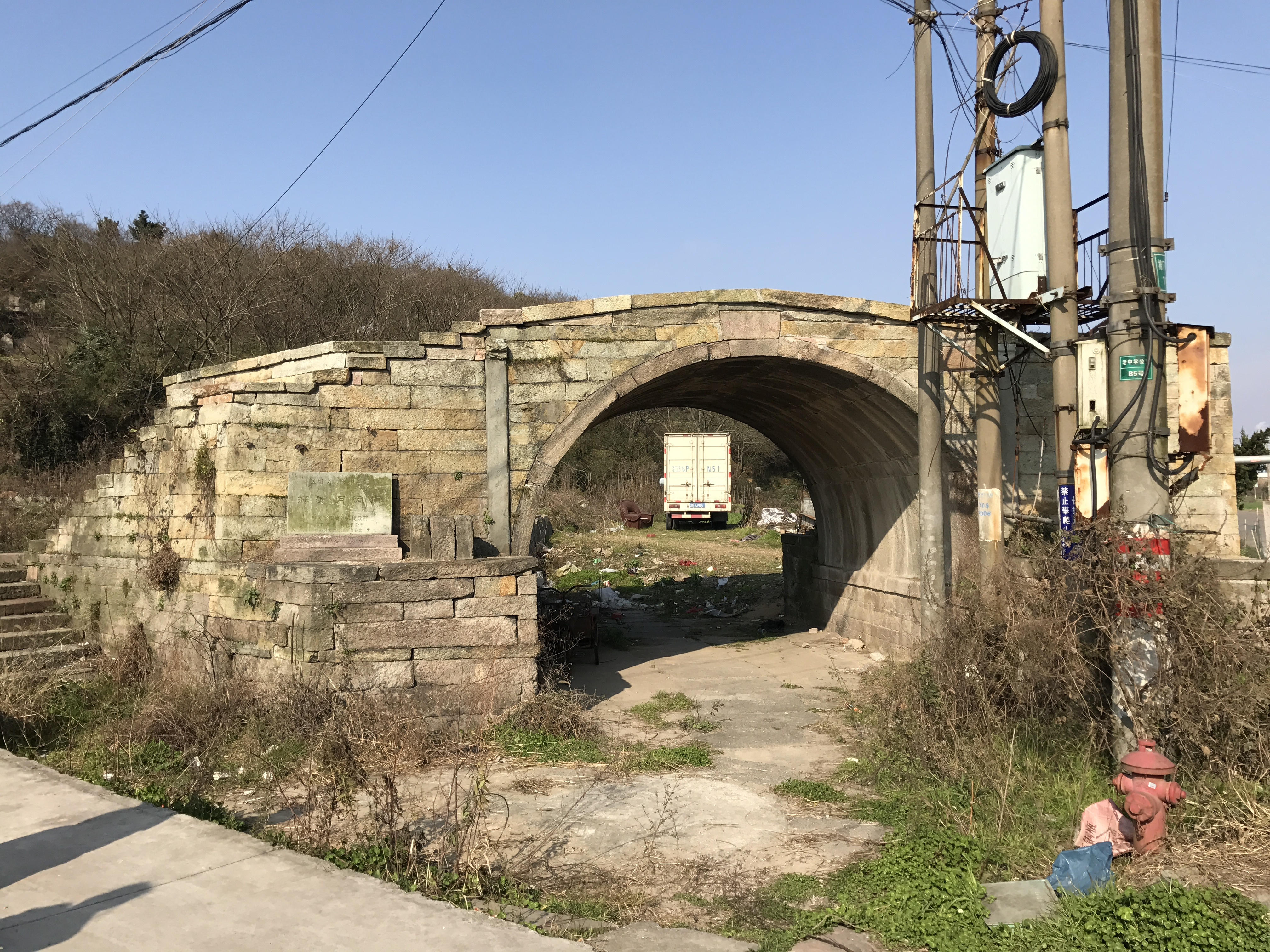 中文（中国大陆）: 蟹浦月洞门正面